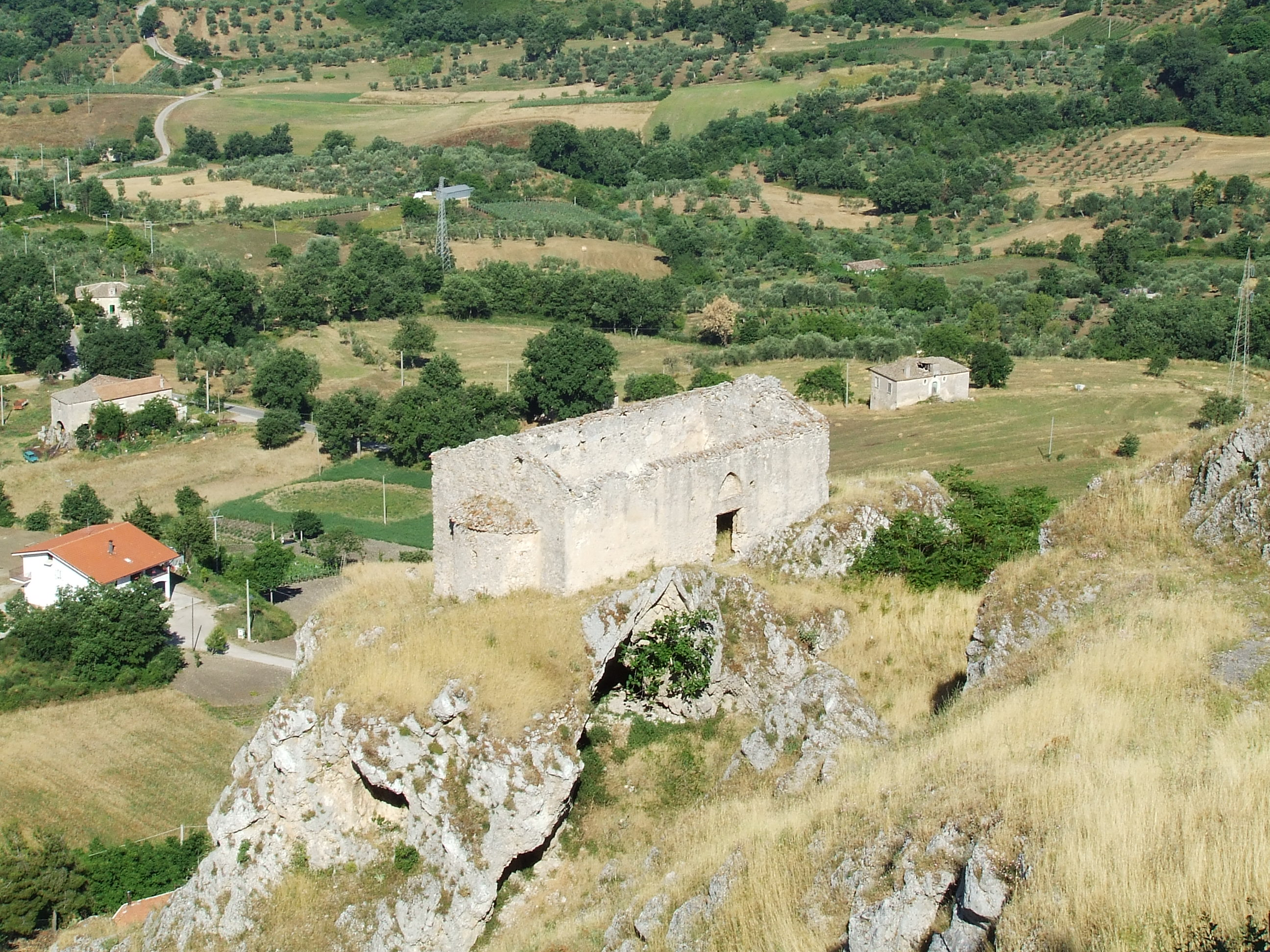 Chiesa di Santa Venere di Caggiano